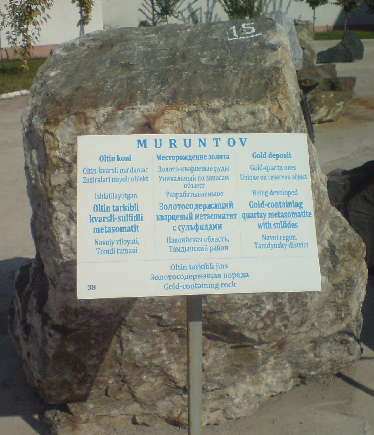 Золотосодержащая порода (золотосодержащий кварцевый метасоматит с сульфидами) месторождения Мурунтау, одного из крупнейших в мире месторождений золота (Узбекистан). Экспонат Геологического парка Музея геологии в г. Ташкенте